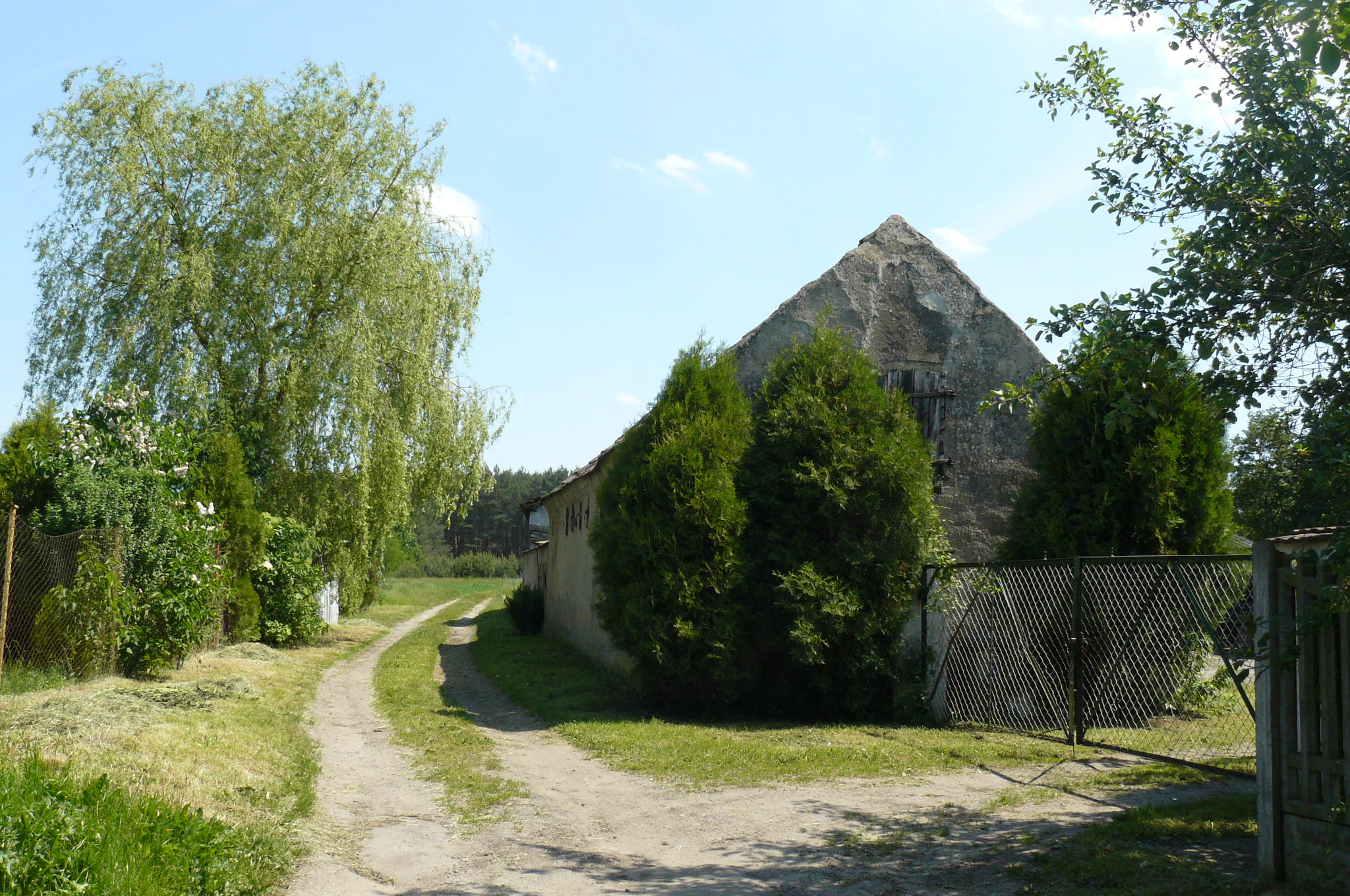 Kopylnik w Poznaniu (Sypniewo).